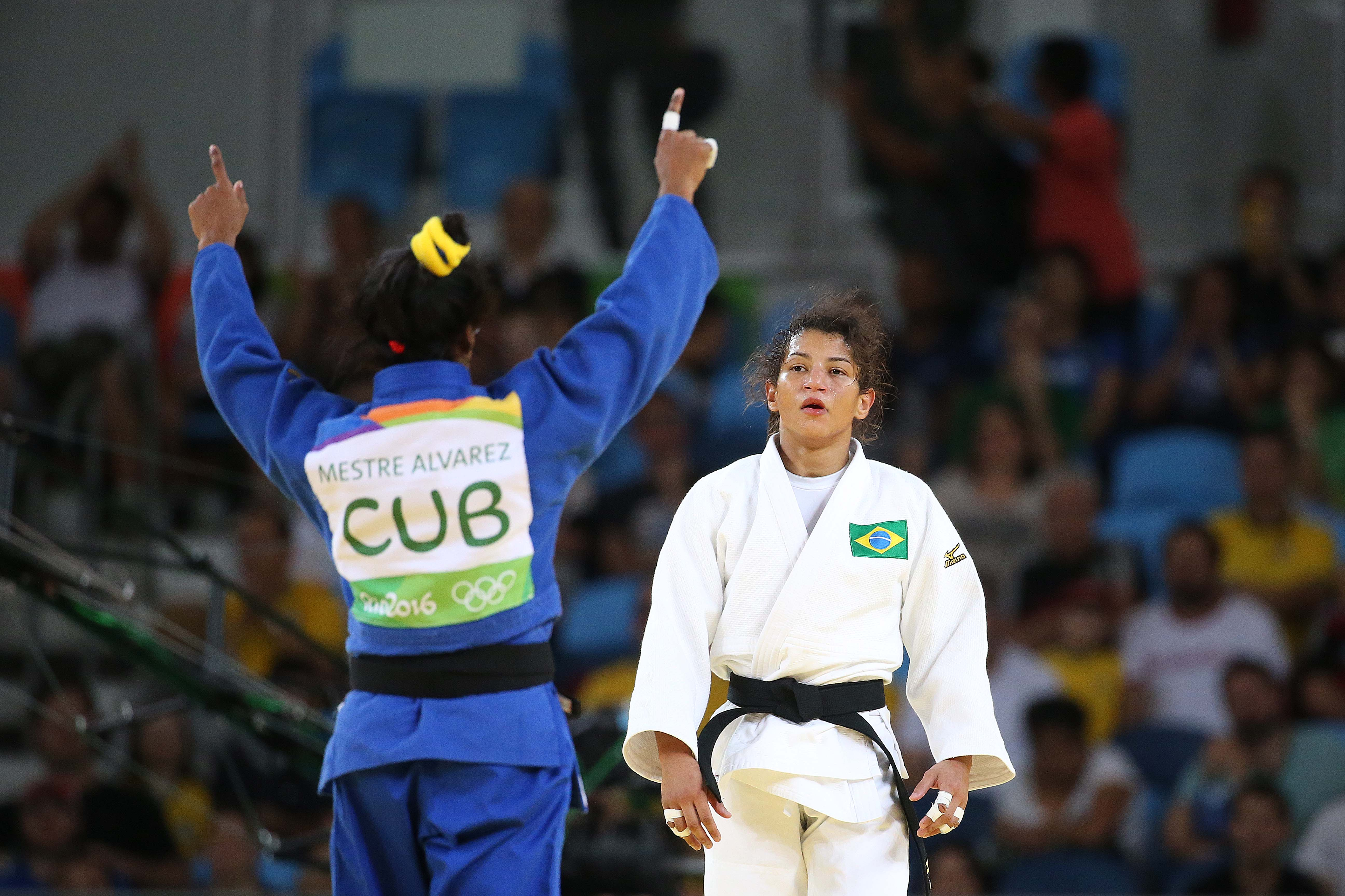 06 de Agosto de 2016 - Rio 2016 -Judô- Sarah Meneses X ALVAREZ - Sarah Pedre a luta para Cubana.